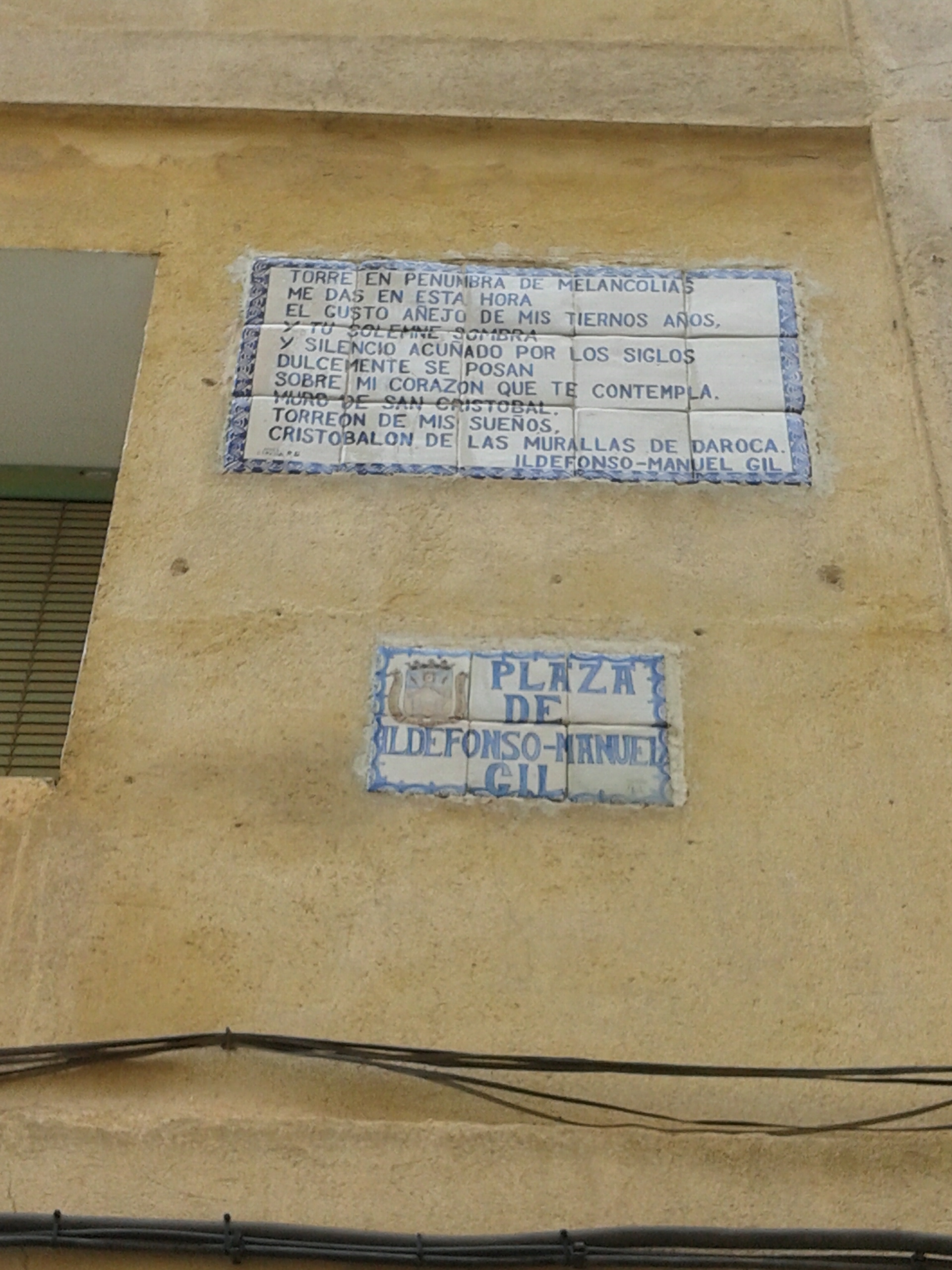 Ildefonso Manuel Gili eskainitako plakak Darocan.